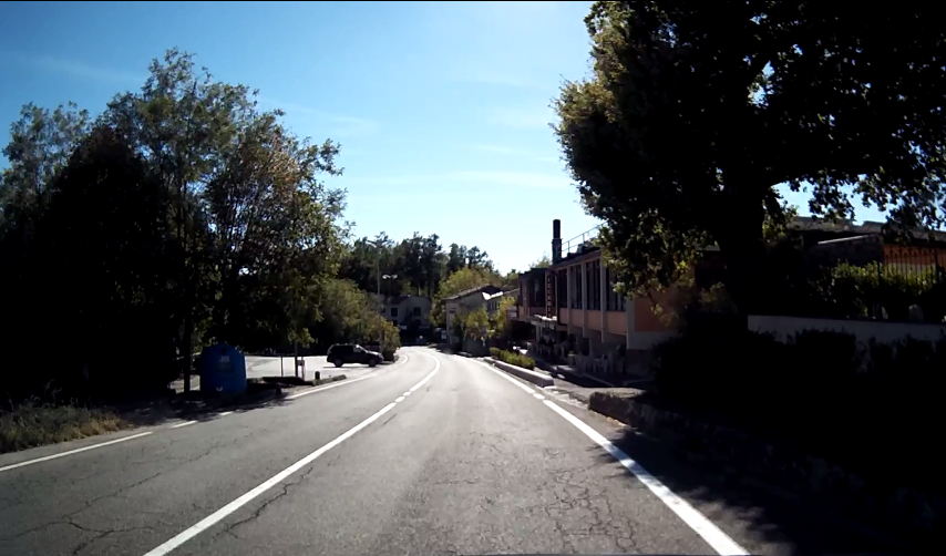 Pistoia, frazione Signorino